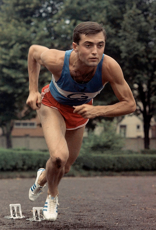 Sergio Ottolina training in Milan